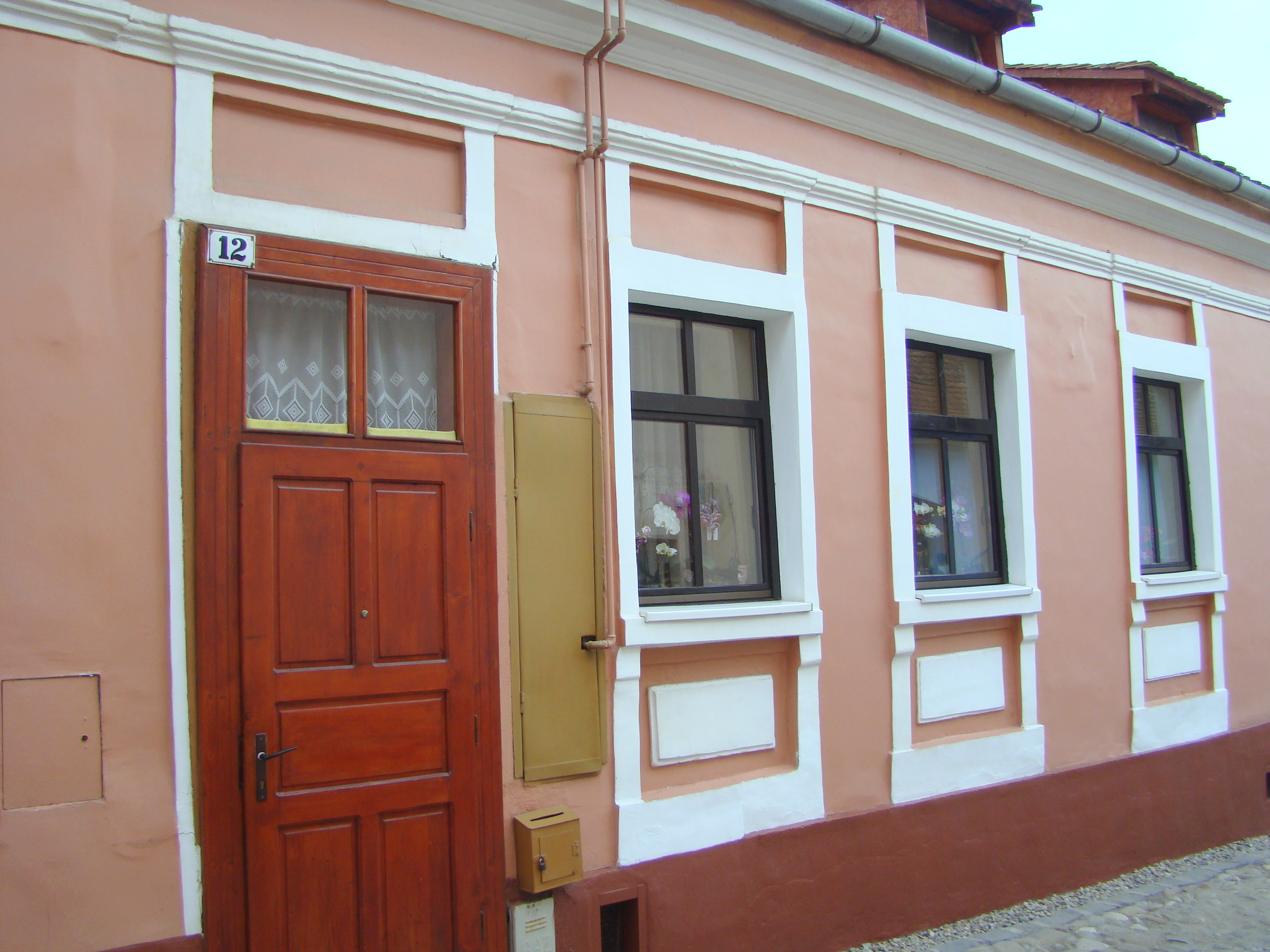 Romani čhib: Casa Markus, municipiul Sighișoara, str. Tâmplarilor 12 1600 - 1650,1678, 1775 - 1800, 1825 - 1850